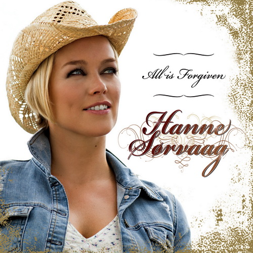 Albumː All is forgiven